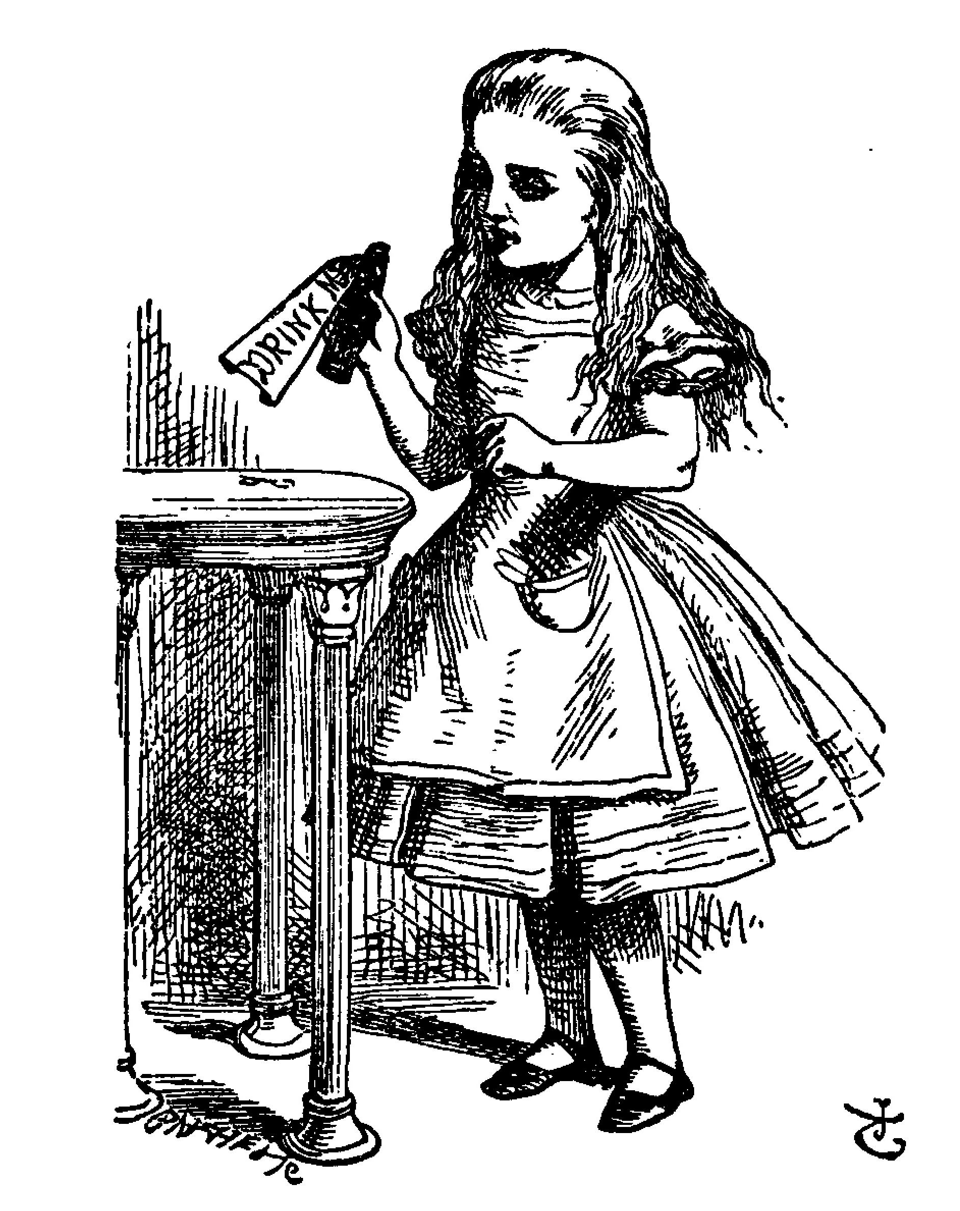 Alice’s Abenteuer im Wunderland Übersetzer: Antonie Zimmermann Orginal Titel: Alice's Adventures in Wonderland Illustrationen: John Tenniel